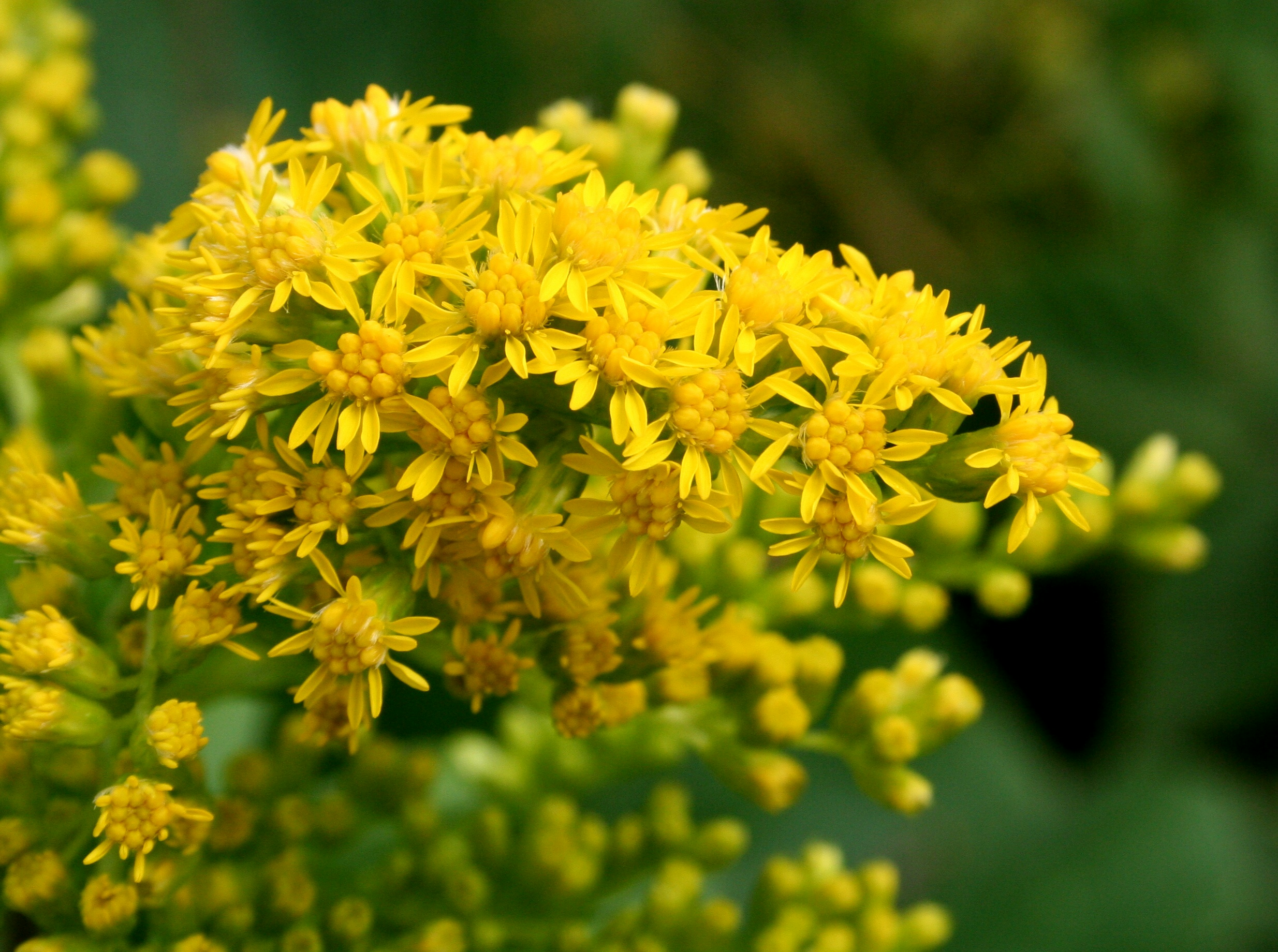 Solidago gigantea - Limana (BL - Italy), 350 m s.l.m. - 8 settembre 2006